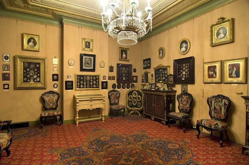 De miniatuurkamer in het Koninklijk Huisarchief. De meer dan 700 miniaturen worden hier gepresenteerd zoals in het vroegere Paleis aan de Kneuterdijk, waar Koningin Emma (1858-1934) een speciale kamer voor de miniaturen had laten inrichten. De portretminiaturen zijn meestal geplaatst in dezelfde verzamellijsten en - net als destijds - gesorteerd per vorstenhuis of nationale schilderschool. In 1900 werd de verzameling van het Paleis aan de Kneuterdijk overgebracht naar het Koninklijk Huisarchief. De verzameling wordt sinds 1972 beheerd door de Stichting Historische Verzamelingen van het Huis Oranje-Nassau.